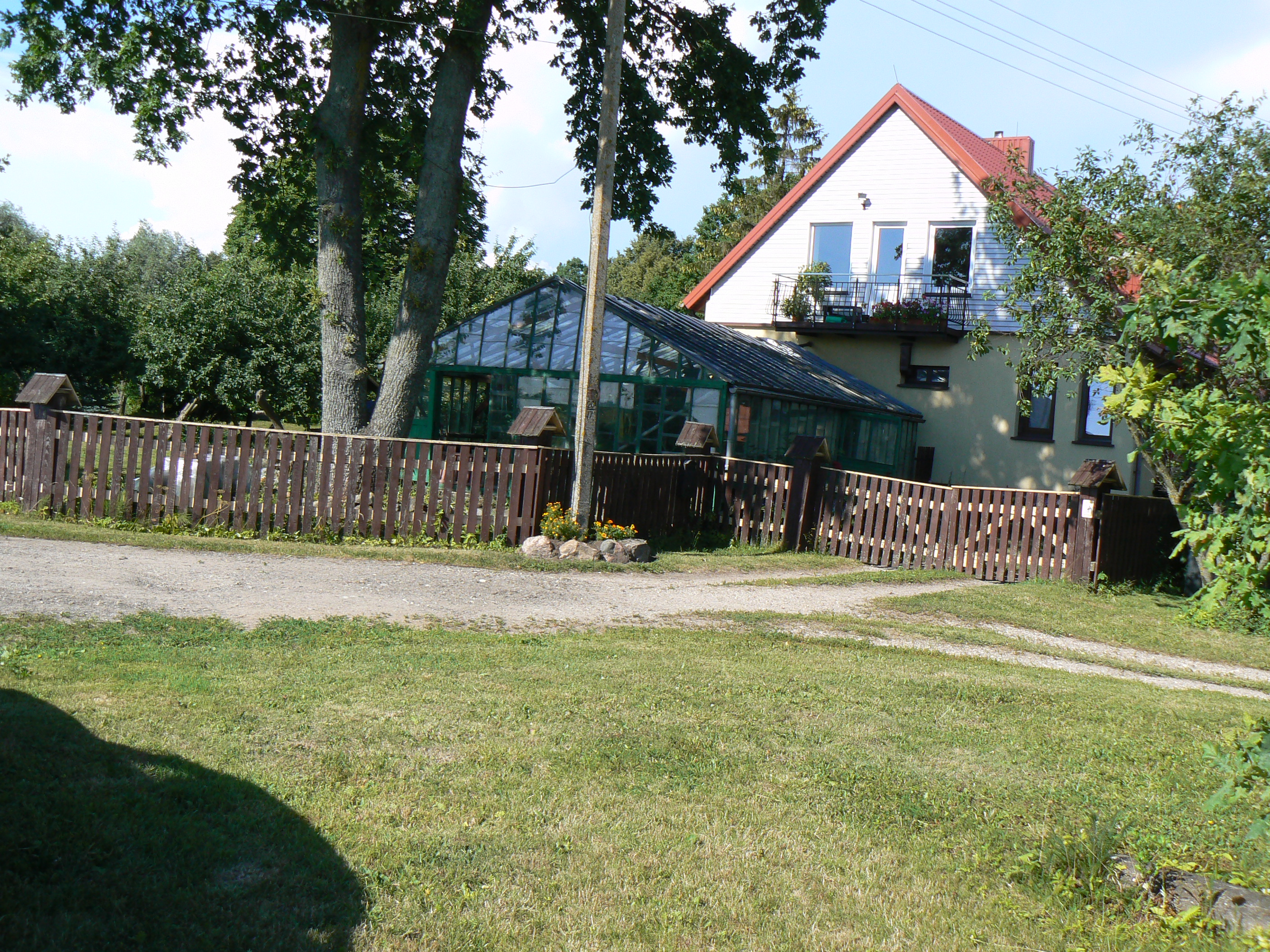 Dům na konci ulice Barškių v Klaipėdské čtvrti Sendvaris. Pohled k východuLietuvių: Barškių gatvė Sendvaryje